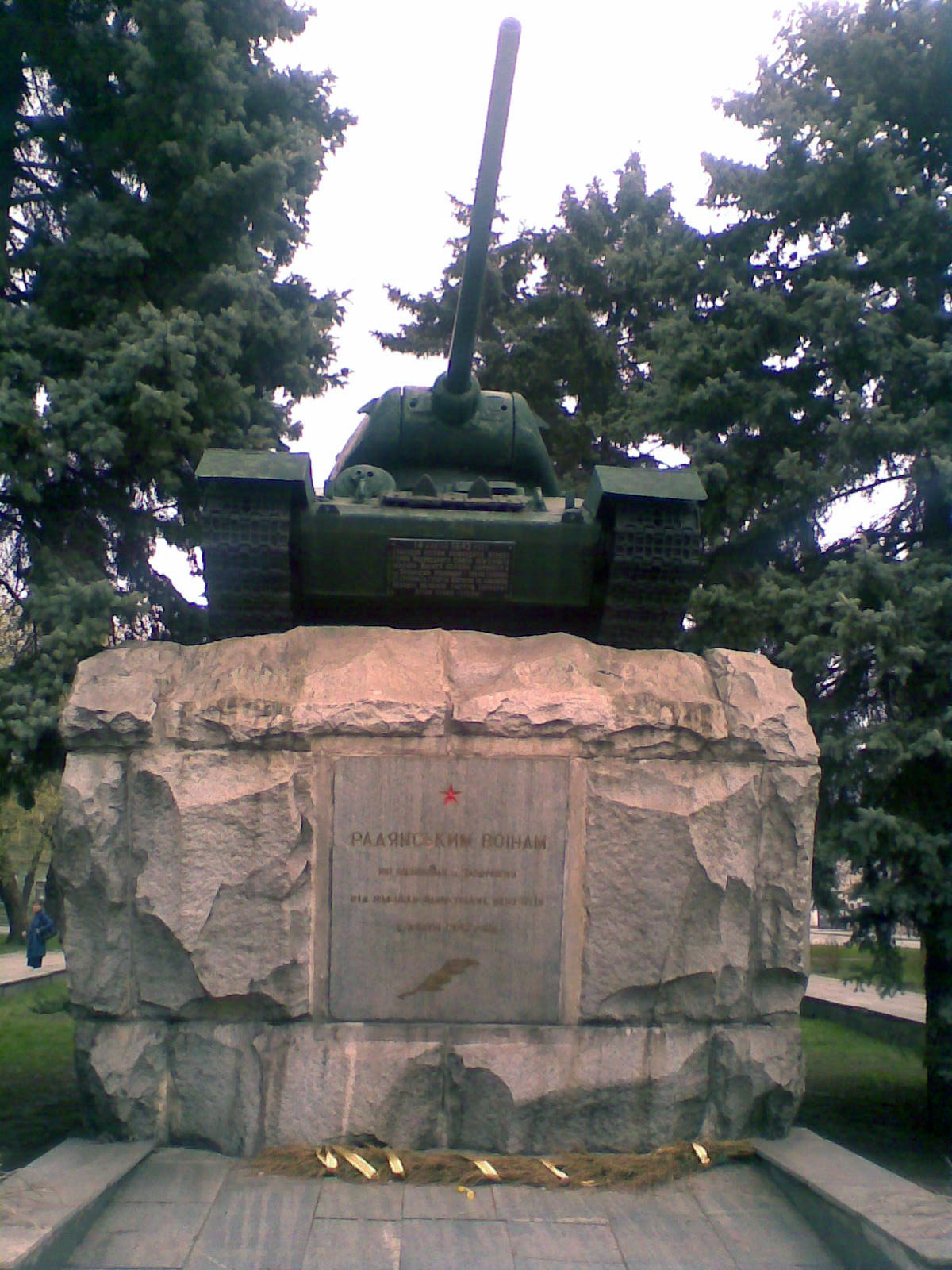 Танк Т-34/85, памятник экипажу танка Т-34: его командиру лейтенанту, Герою Советского Союза (посмертно) Николаю Яценко, ст. сержанту Георгию Барикуну и ст. сержанту Михаилу Лебедеву с ротой автоматчиков первому ворвавшемуся (и погибшему в уличных боях) во время освобождения Запорожья от немецко-фашистских захватчиков в октябре 1943 года.